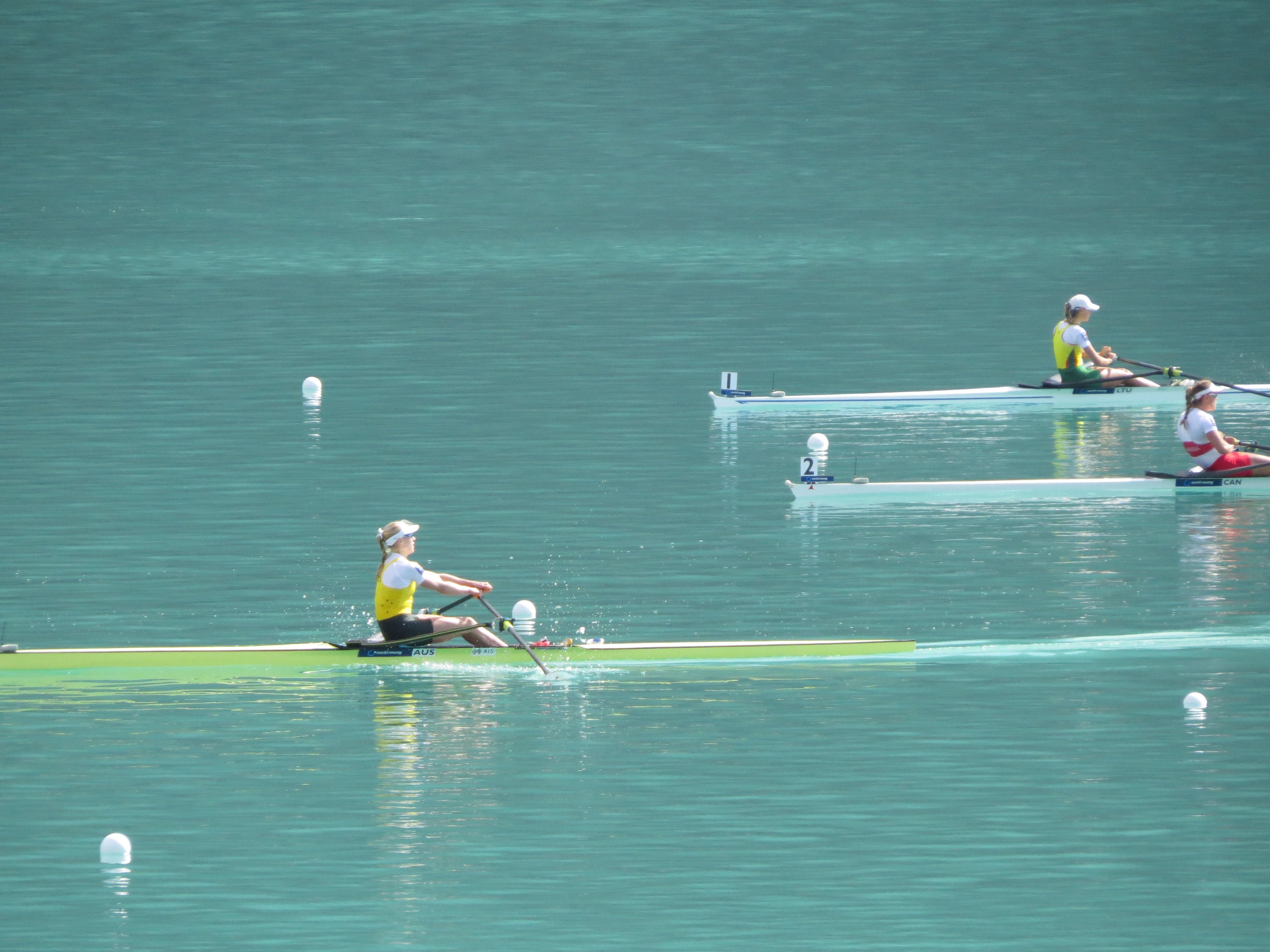 Bateaux en demi-finale du W1x AUS : CROW, Kimberley CAN : ZEEMAN, Carling LTU : SALTYTE, Lina